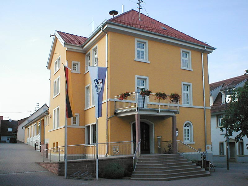 Rathaus in Eschelbronn, erbaut 1838